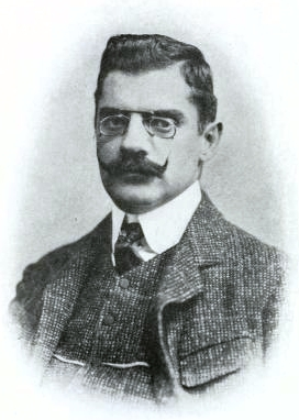 Imagen de Víctor Pérez Petit, escritor uruguayo, nacido en 1871. La foto acompaña una biografía en inglés